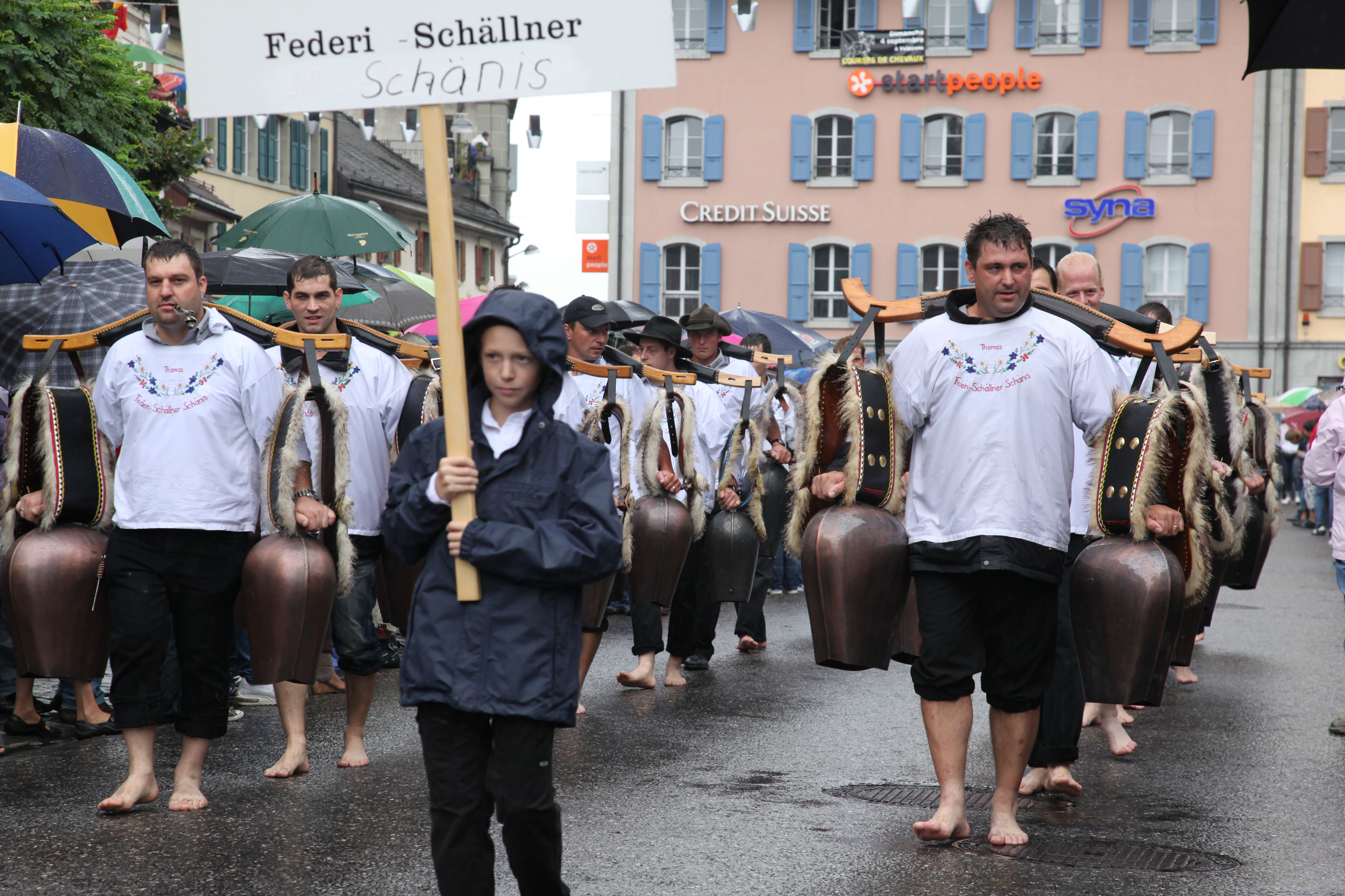 Instantanés de la Fête fédérale des sonneurs de cloches à Bulle (canton de Fribourg en Suisse). Cortège du 4 septembre 2011. Umzug vom sonntag 4. September durch die Stadt Bulle. Photo: Pierre Schwaller